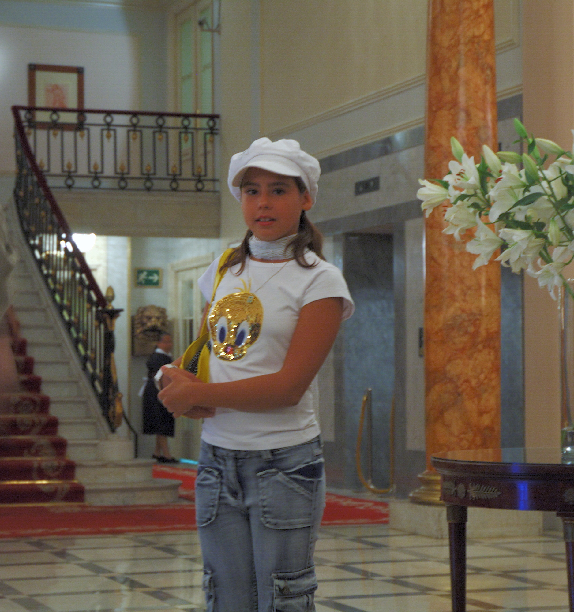 La actriz española Yaiza Esteve en el Festival Internacional de Cine de San Sebastián de 2006.